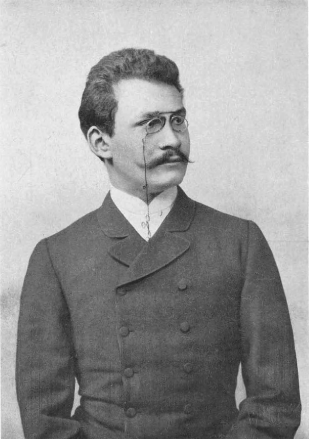 Hermann Minkowski